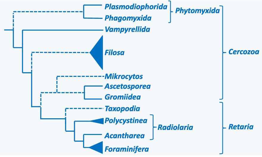 Phylogénie des Rhizaria - Philippe Silar. Protistes Eucaryotes: Origine, Evolution et Biologie des Microbes Eucaryotes. 2016,978-2-9555841-0-1. �hal-01263138